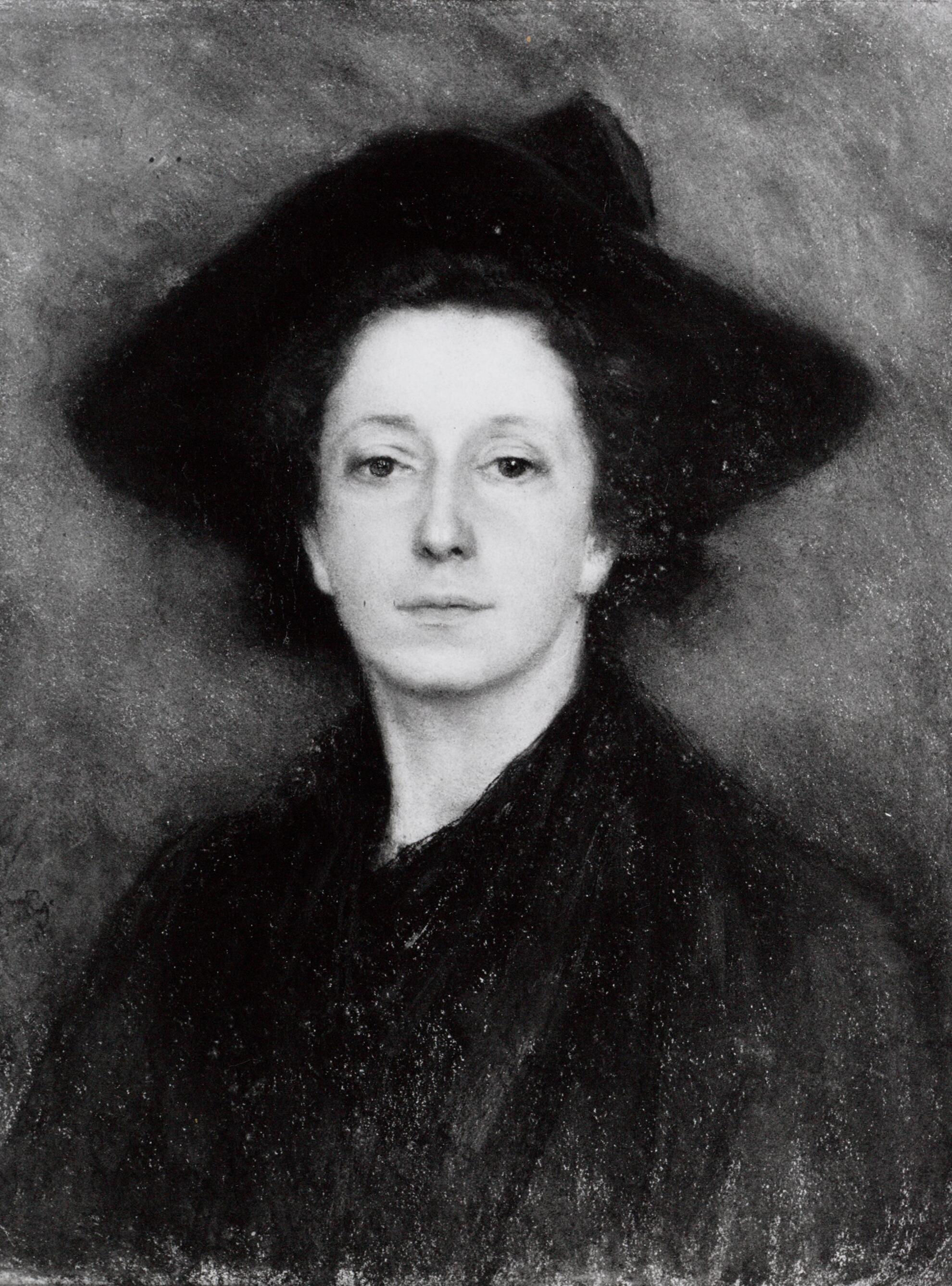 Zelfportret van Bramine Grandmont-Hubrecht